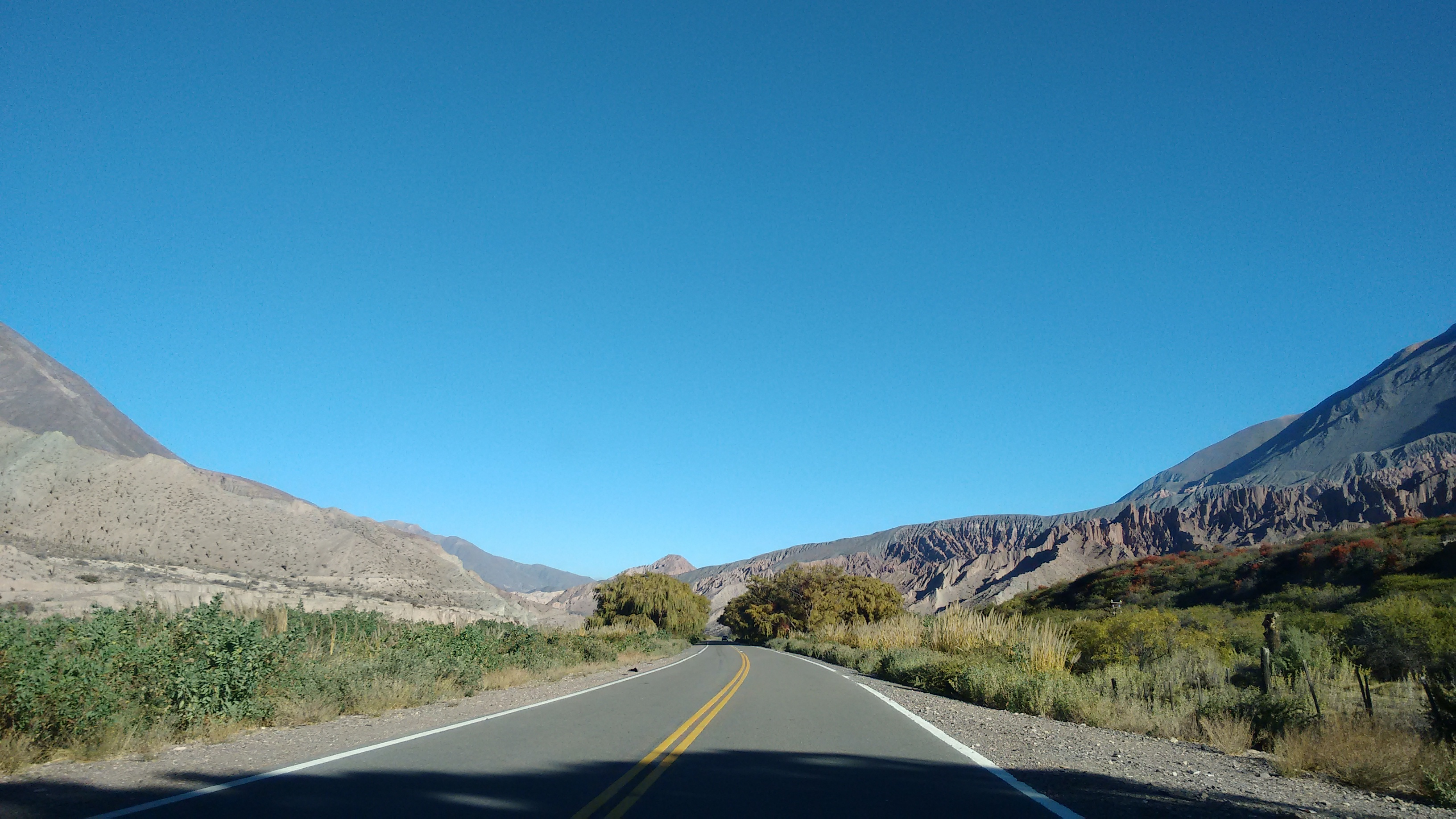 monumento natural. lugares